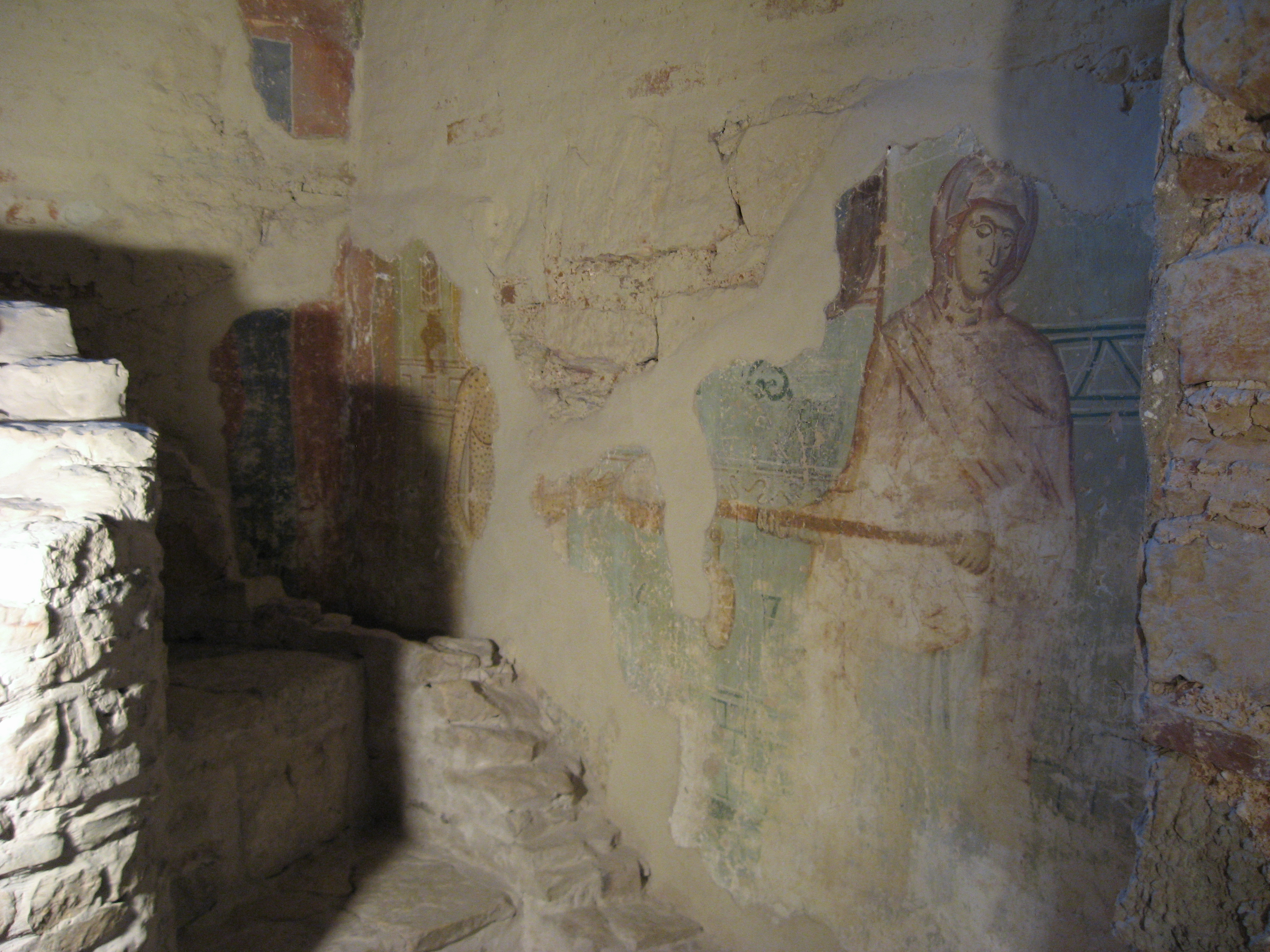 Фрески в нартексе Николо-Дворищенского собора. Иов на гноище.